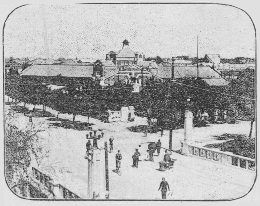 台中第一市場位於現今東協廣場，前方橋樑為跨越綠川的櫻橋